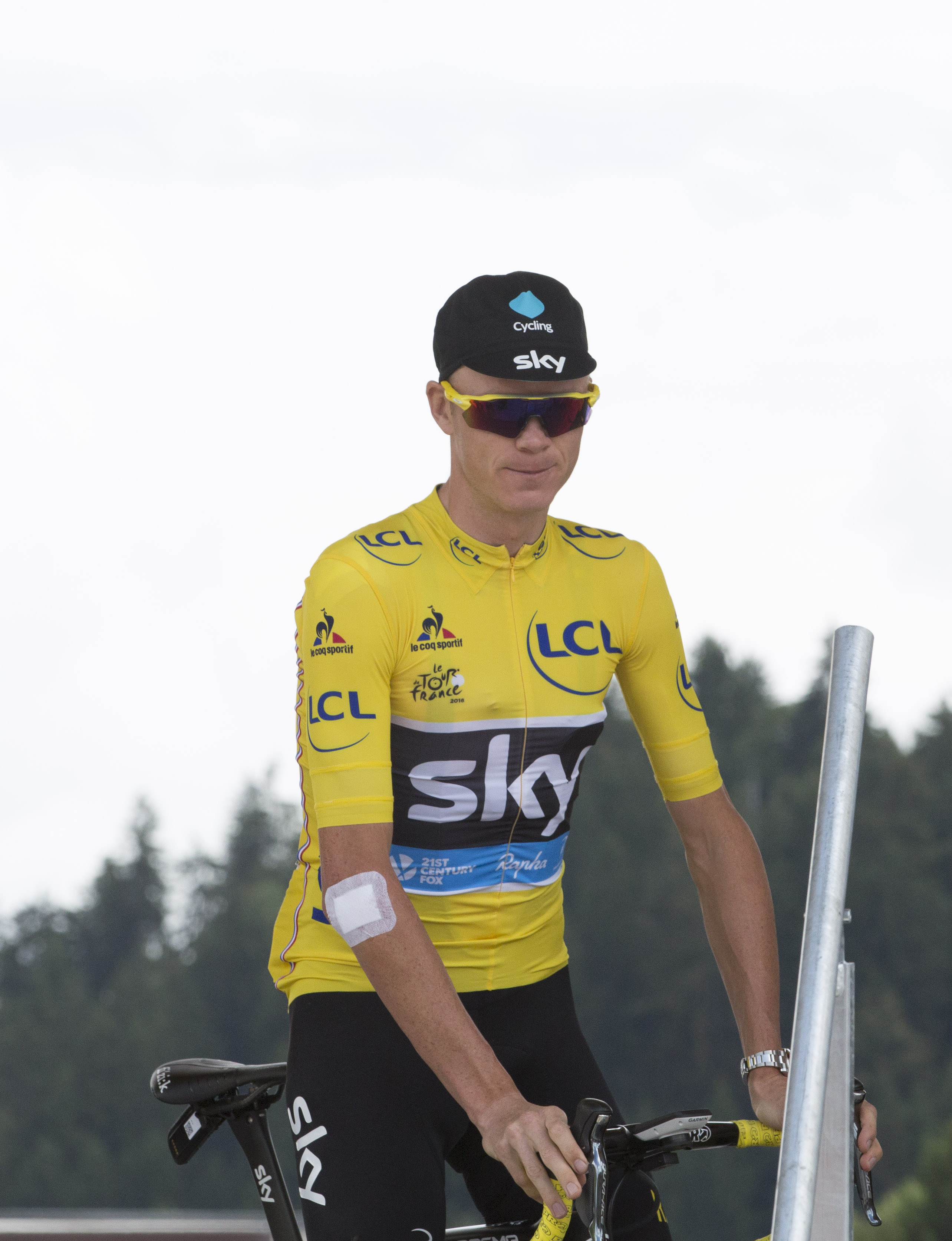 Chris Froome